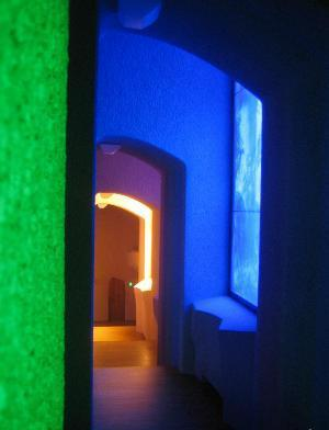 Aufgang im Großen Saal im Goetheanum in Dornach